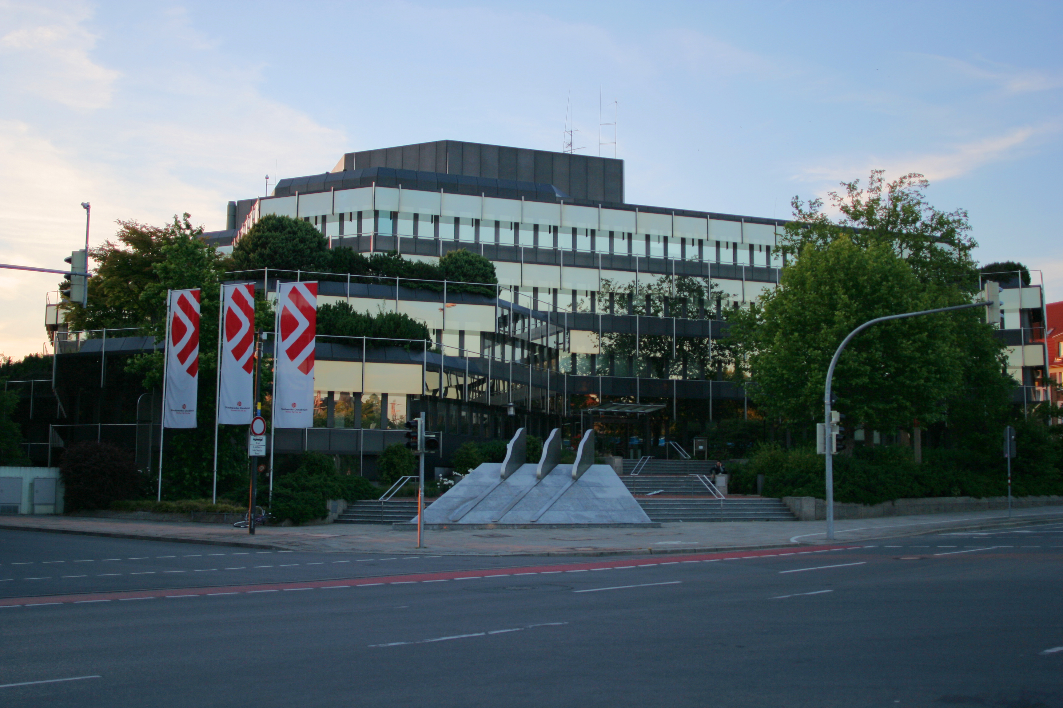 Das Gebäude der Stadtwerke in Osnabrück